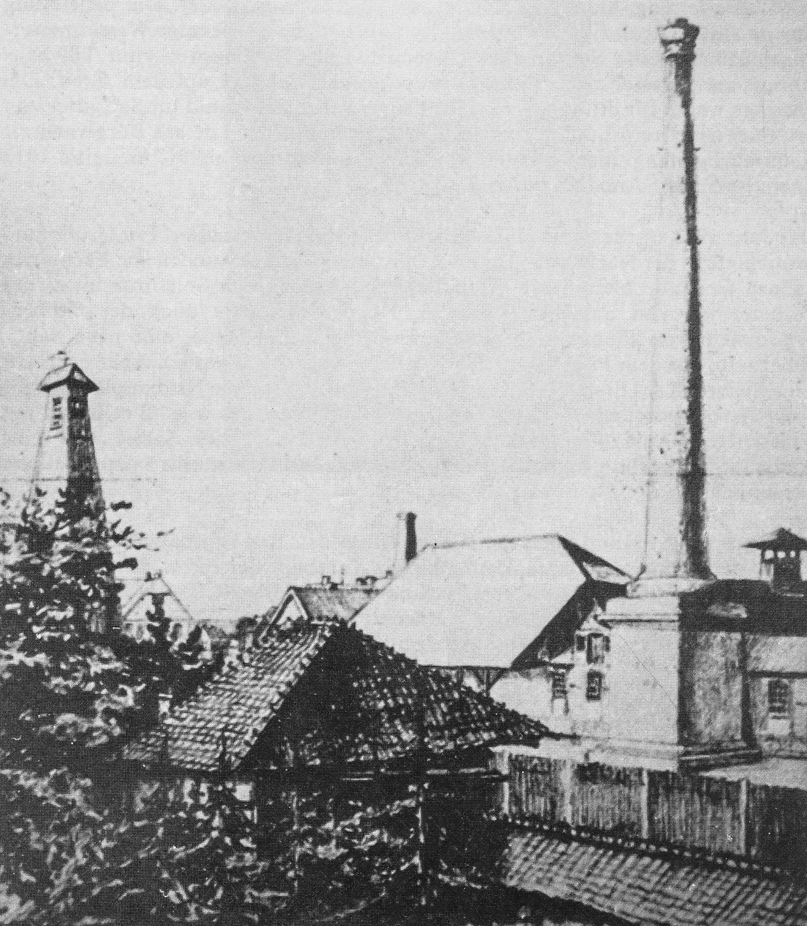 Saline Salzliebenhalle im Jahre 1853 - links der Salinenbohrturm und rechts der Schornstein der Siedehäuser. Zeichnung von Urban Schloenbach (1841-1870)